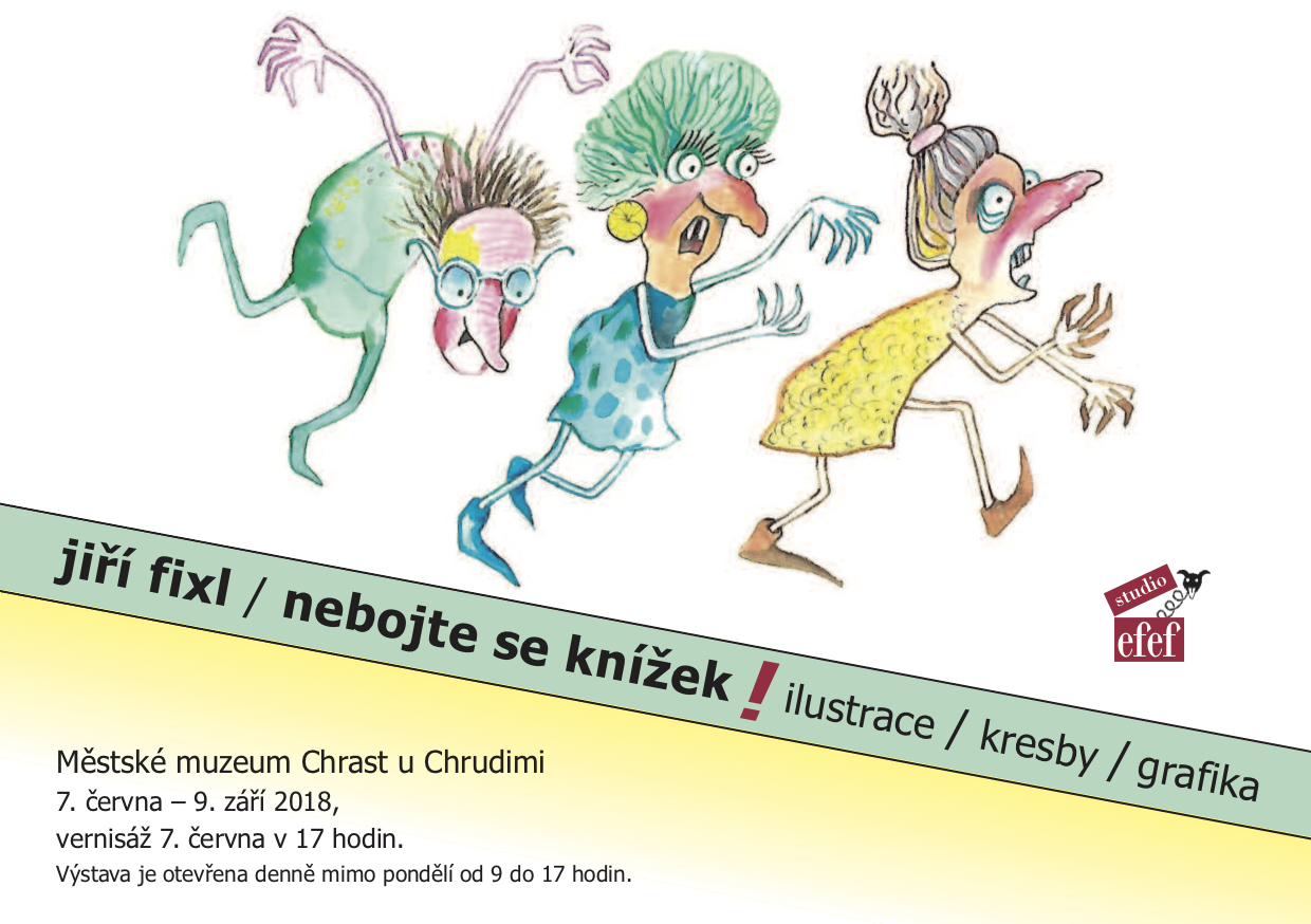 Pozvánka na výstavu Nebojte se knížek! Ilustrace / kresby / grafika